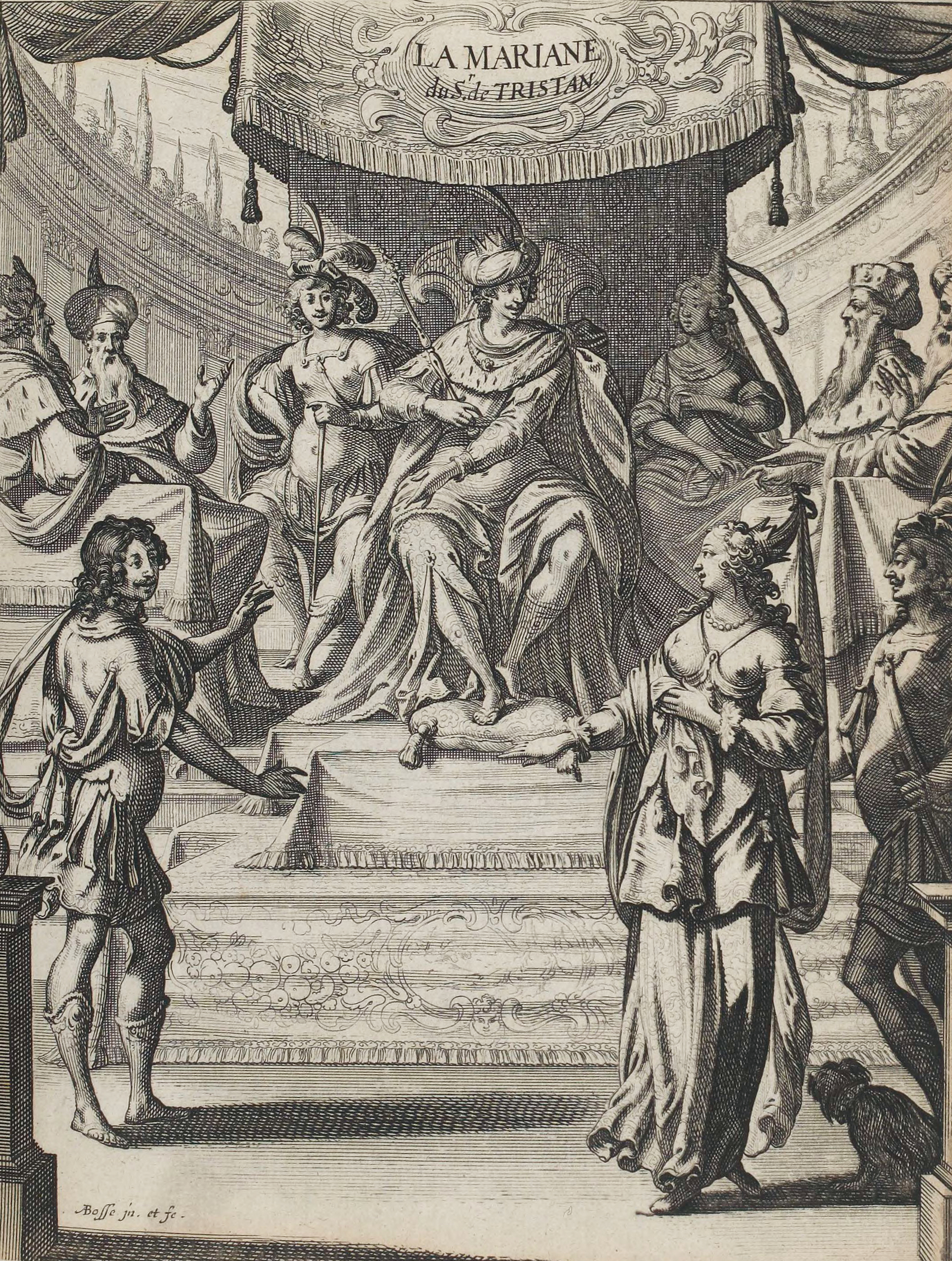 Abraham Bosse, frontispice de la première édition de La Mariane de Tristan L'Hermite